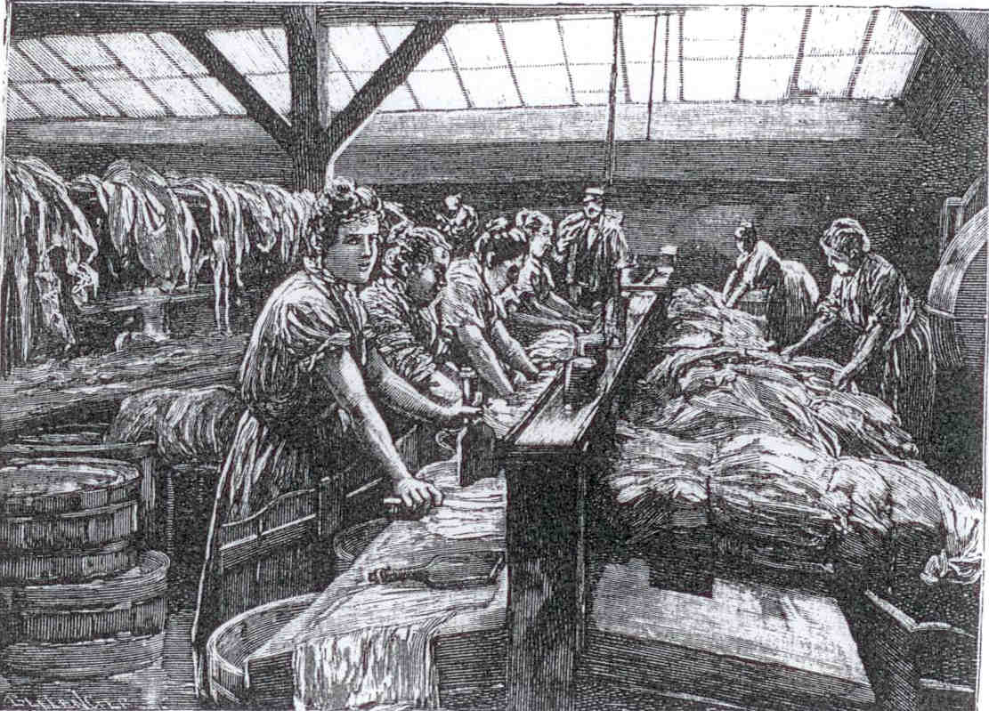 L'intérieur d'un lavoir parisien juste avant la Fête des Blanchisseuses